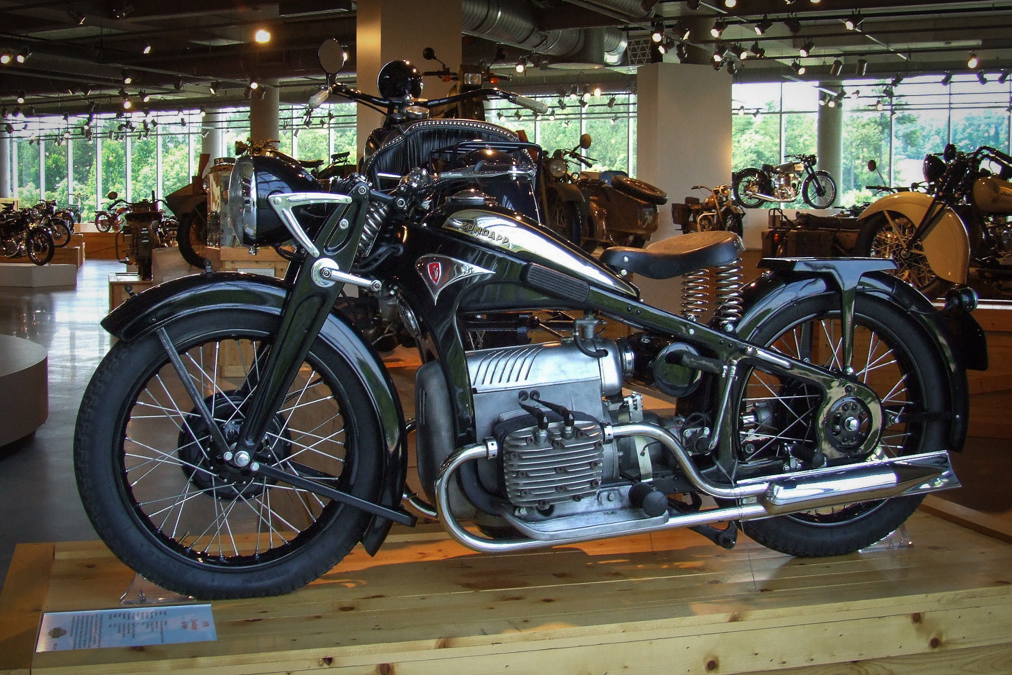 Zündapp K800 (1938) im Barber Vintage Motorsports Museum, Birmingham Alabama USA